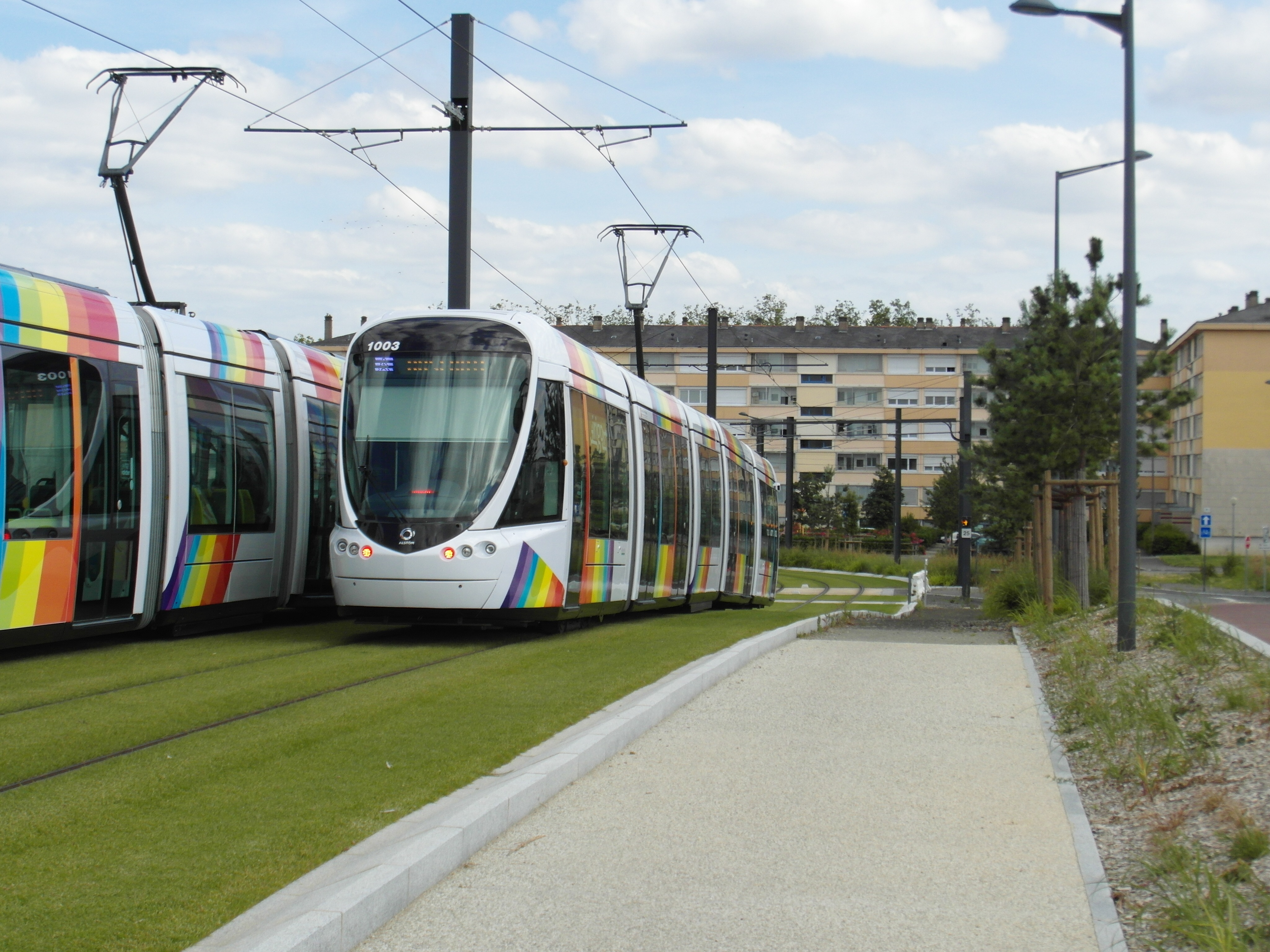 Straßenbahn Angers - Städtebeuliche Integration im Bereich Mayenne / Capucins, einem Entwicklungsgebiet auf ehemaligem Militärflughafengelände